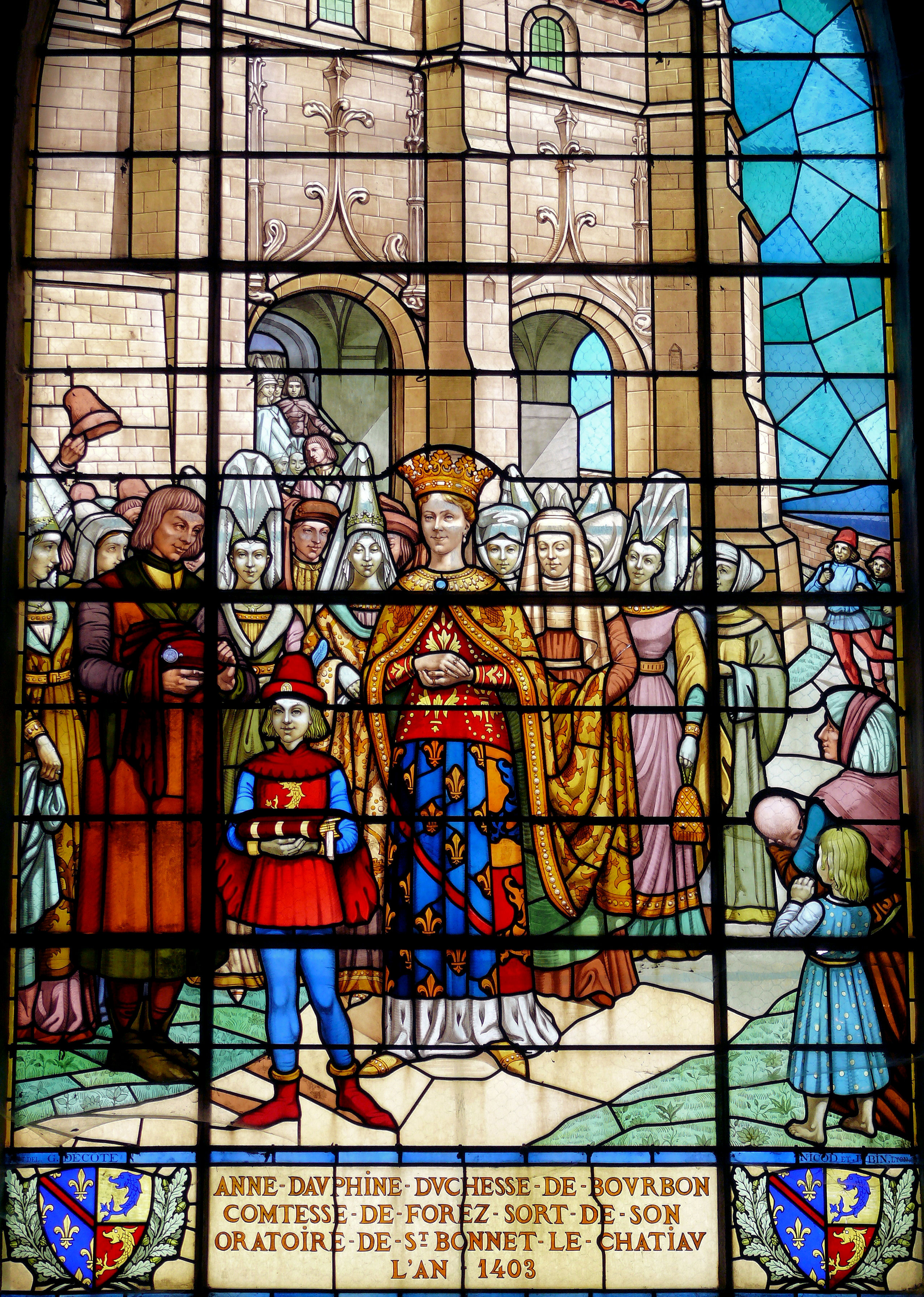 Collégiale de Saint-Bonnet-le-Château - Vitrail de la visite de la Dauphine à Saint-Bonnet